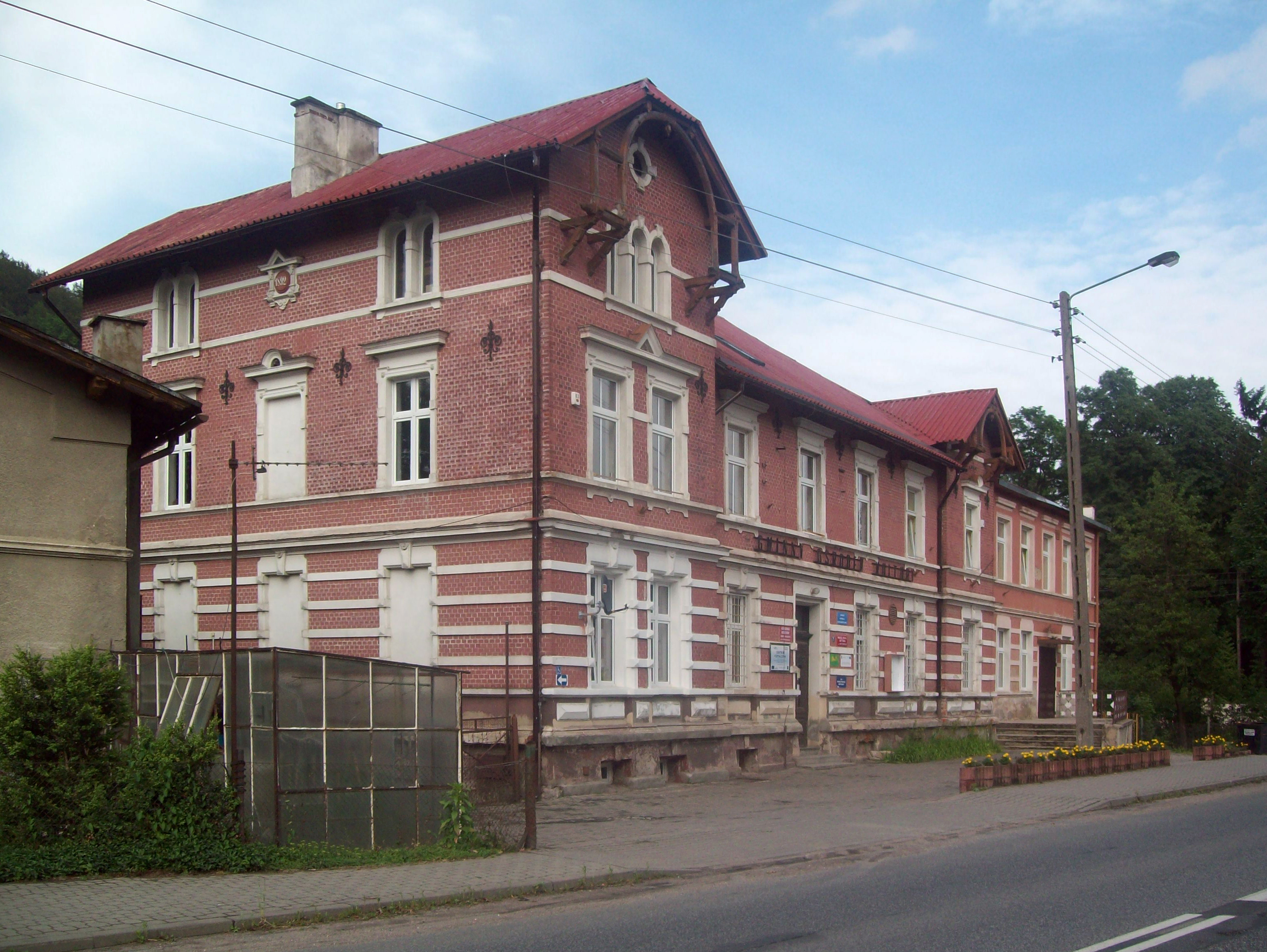 Gminny ośrodek Kultury w Ołdrzychowicach Kłodzkich